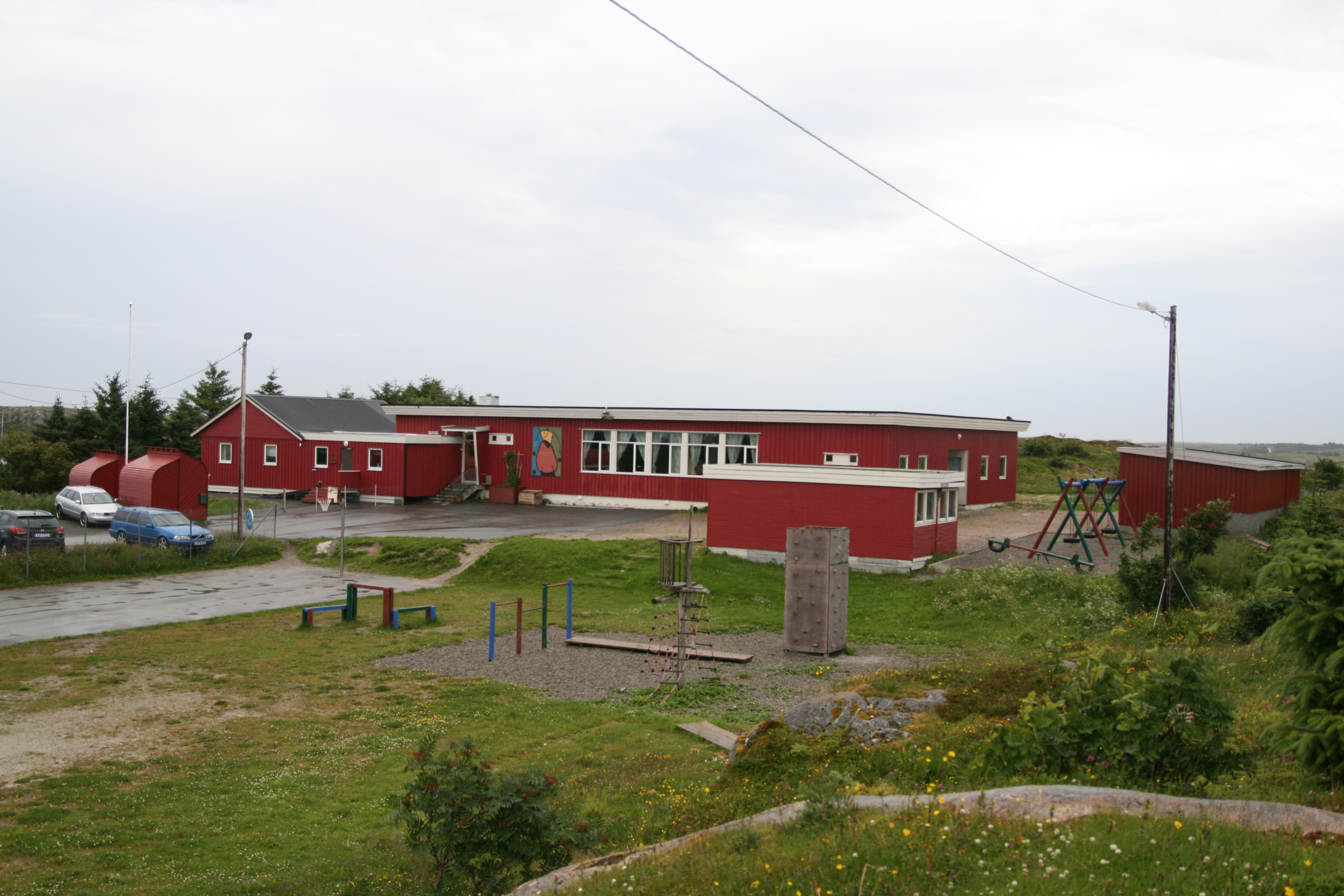 Dyrøya oppvekstsenter